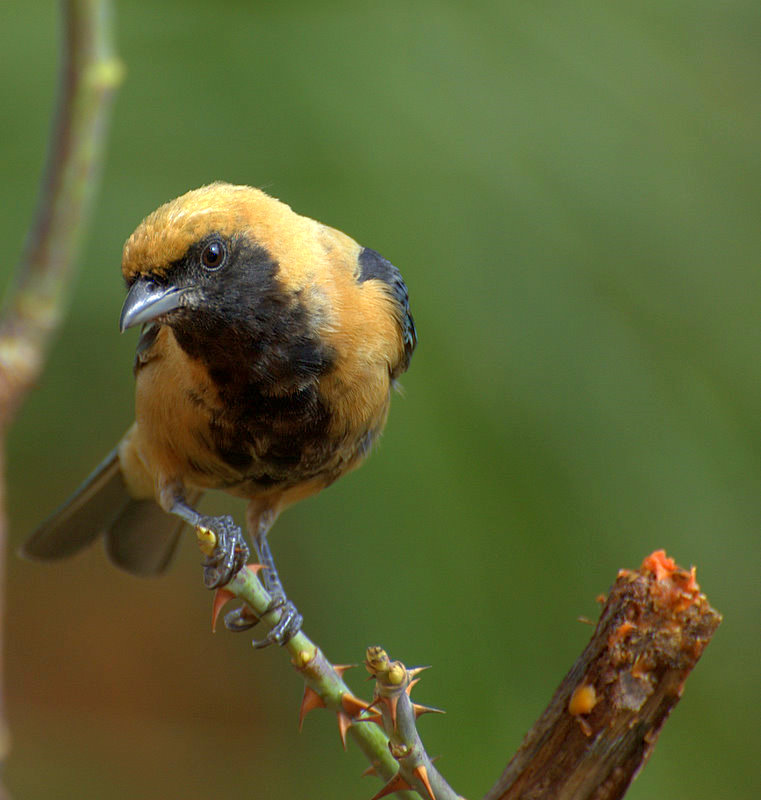 Tangara cayana, No quintal da casa dos meus pais na cidade de Piraju-SP